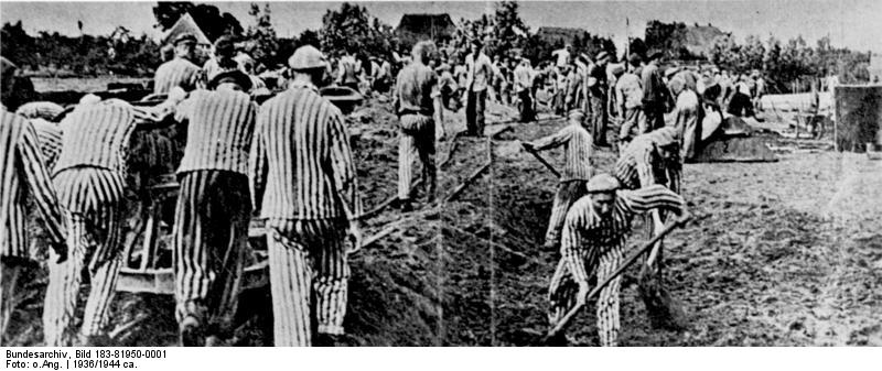 KZ Sachsenhausen, Häftlinge bei Erdarbeiten ADN-Zentralbild/Repro 8.4.1961 Zur Einweihung der Mahn-und Gedenkstätte Sachsenhausen am 23.April 1961 Vor den Toren Berlins, auf dem Gelände des ehemaligen faschistischen Konzentrationslagers Sachsenhausen bei Oranienburg, in das von 1936 bis zum Kriegsende 200 000 Menschen von den faschistischen Mördern gewaltsam verschleppt wurden, entsteht - wie in Buchenwald und Ravensbrück - eine würdige Mahn-und Gedenkstätte. UBz: Nahe am KZ Sachsenhausen mußten die Häftlinge für ihre Mörder eine ganze Siedlung von Einfamilienhäusern bauen. - Häftlinge bei den Erdarbeiten auf dem Baugelände.